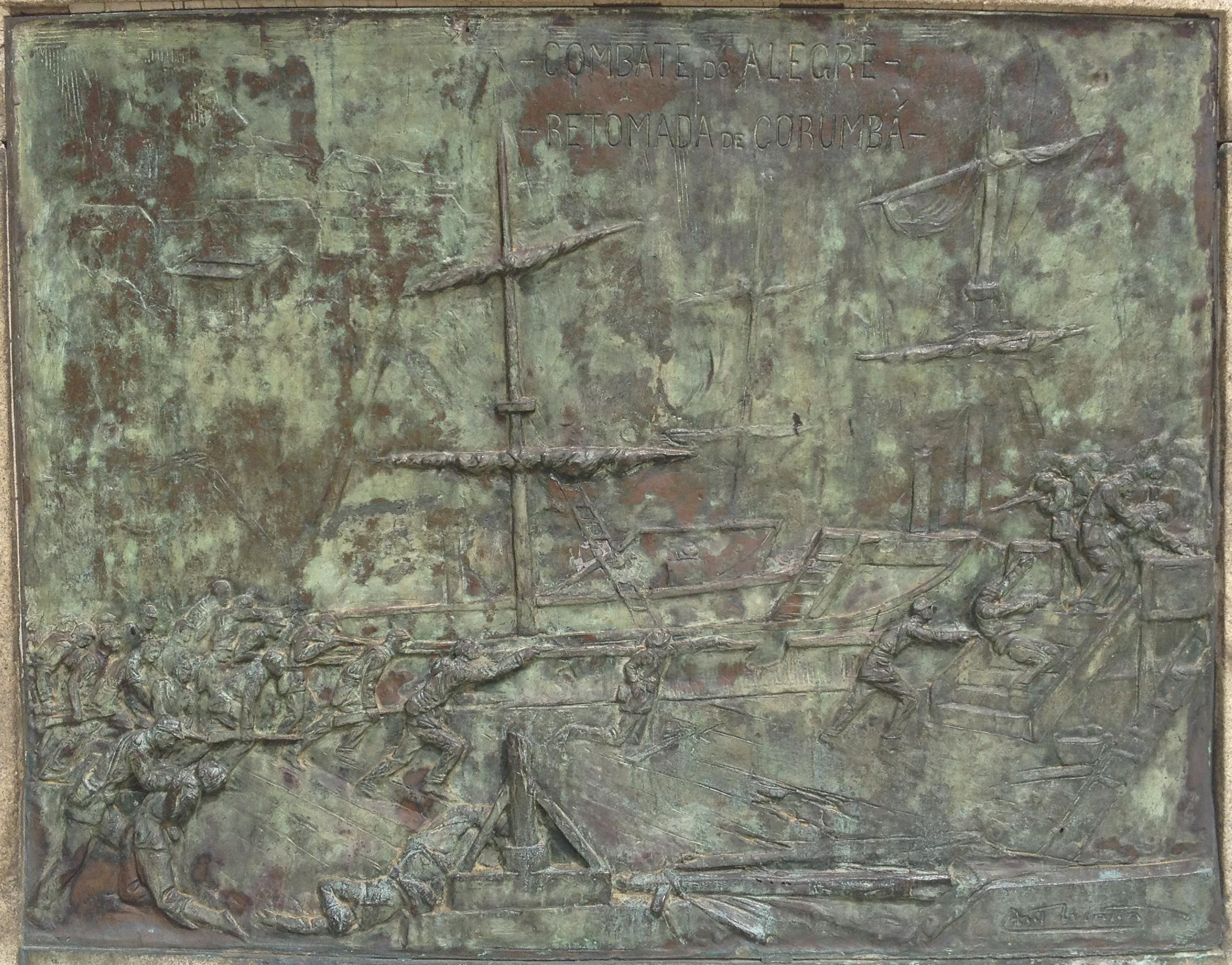 Combate do Alegre - Retomada de Corumbá (Monumento aos Heróis de Laguna e Dourados, localizado no bairro da Urca, no Rio de Janeiro - RJ).